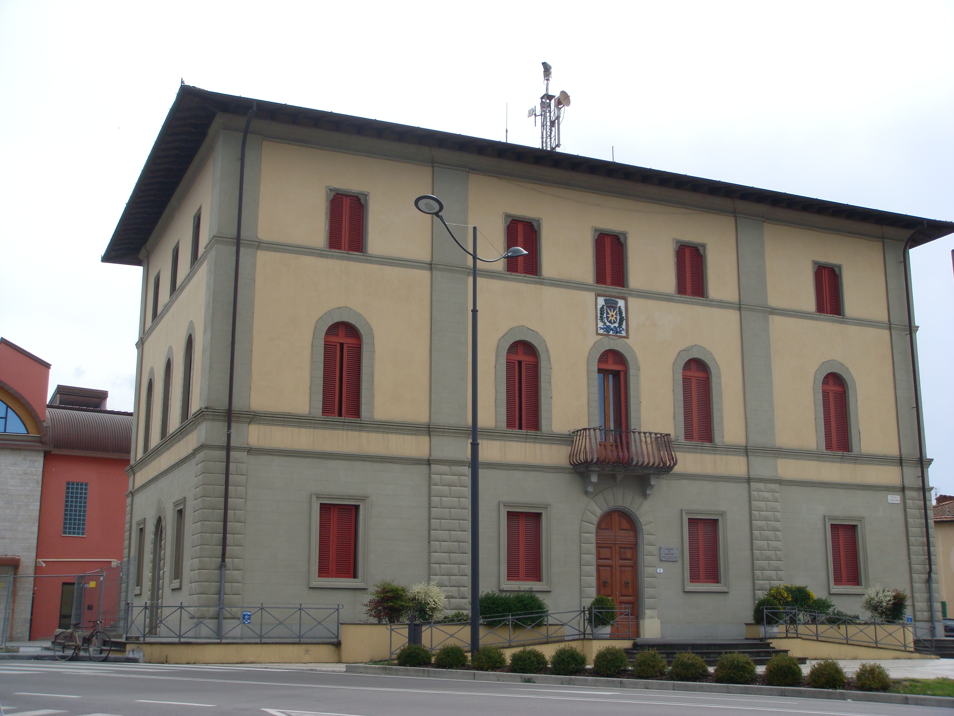 Municipio di Larciano (Provincia di Pistoia, Italia) nella piazza principale di San Rocco